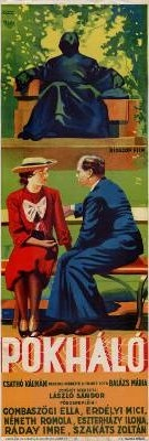 A Pókháló című 1936-os magyar film plakátja